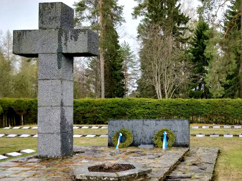 Мемориальное кладбище